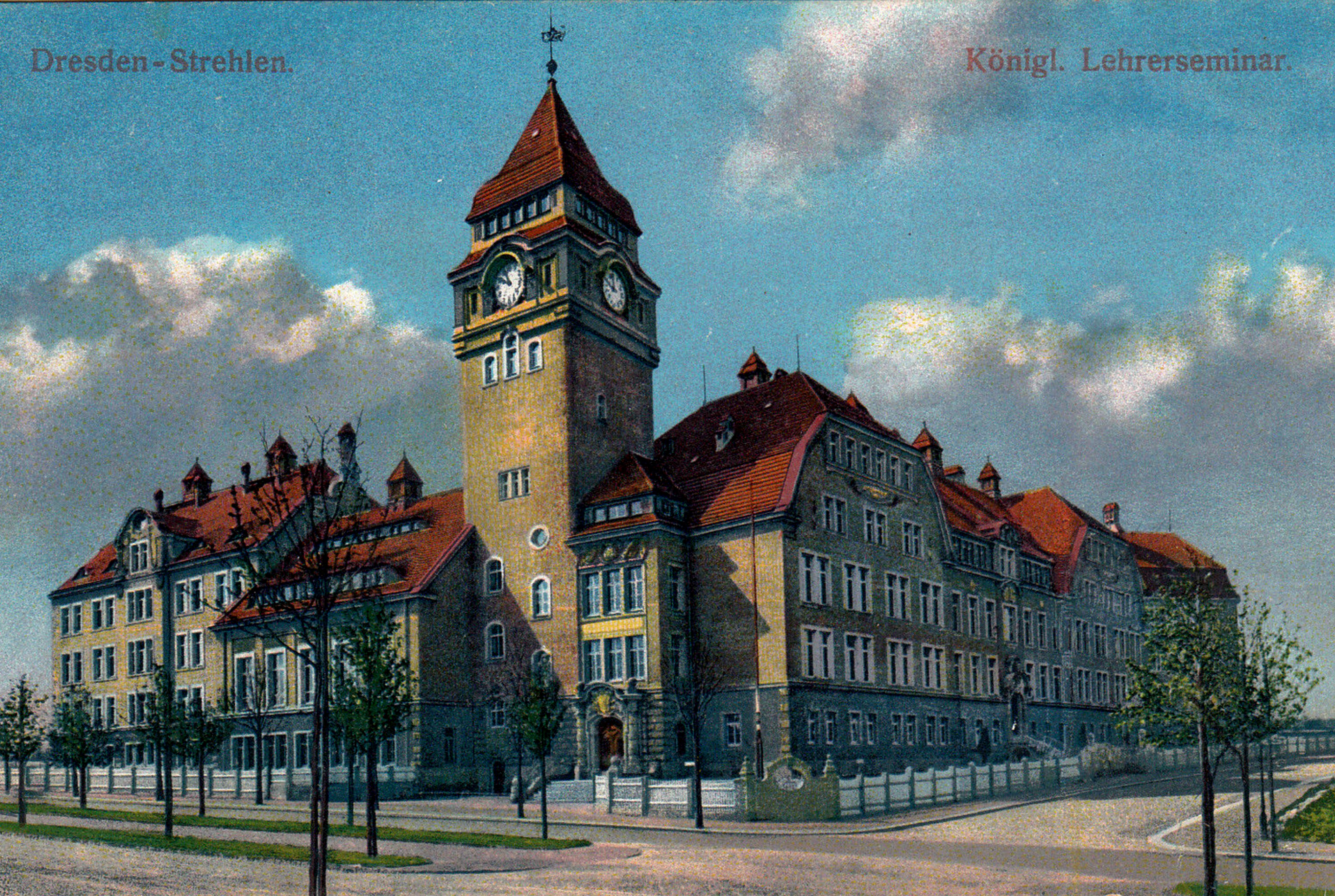 Dresden, TU-Gebäude am Weberplatz, Königliches Lehrerseminar - Arbeiter -und Bauernfakultät heute Erziehungswissenschaftliche Fakultät am Weberplatz. Ansichtskarte von 1910